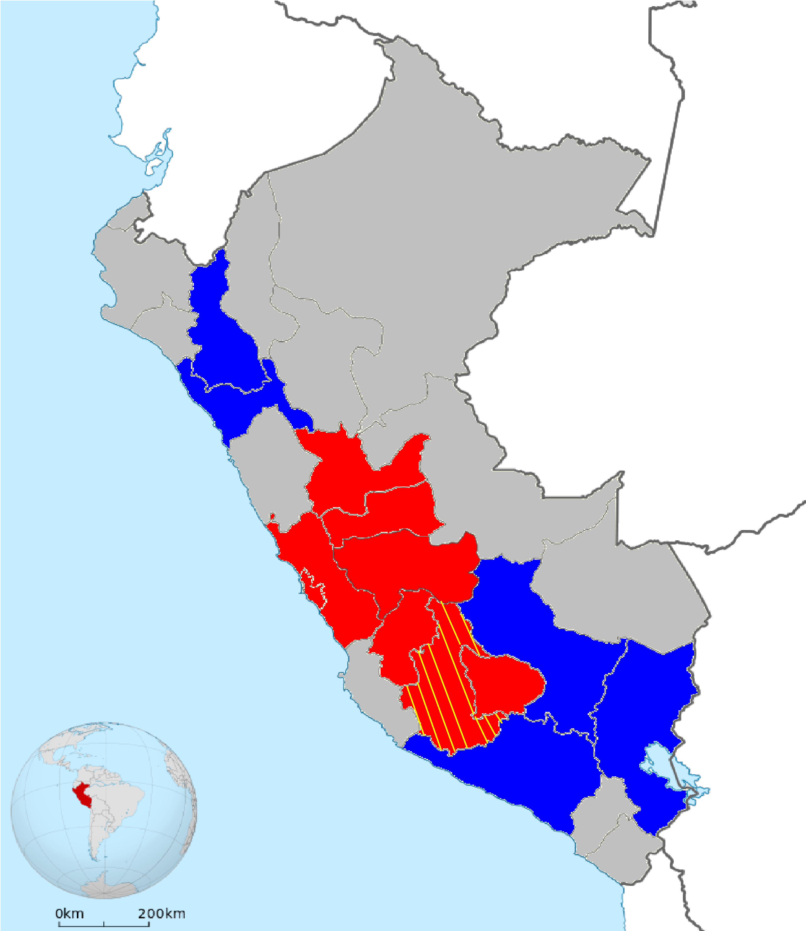 En rojo los departamentos que acataron y/o se expandió el paro En amarillo los departamentos que levantaron el paro En azul los departamentos que no acataron el paro En gris los departamentos que no fueron y/o no respondieron al llamado del paro